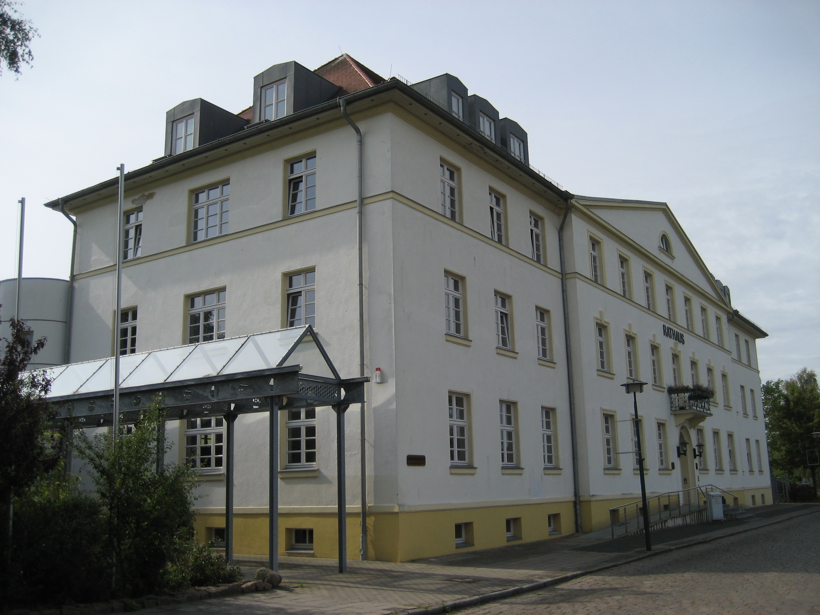 Das Rathaus von Pasewalk in der Haußmannstraße 85. Ursprünglich 1928 als Finanzamt von Pasewalk erbaut, seit der Zerstörung des Alten Rathauses am Marktplatz 1945 jedoch als Sitz der Stadtverwaltung genutzt.